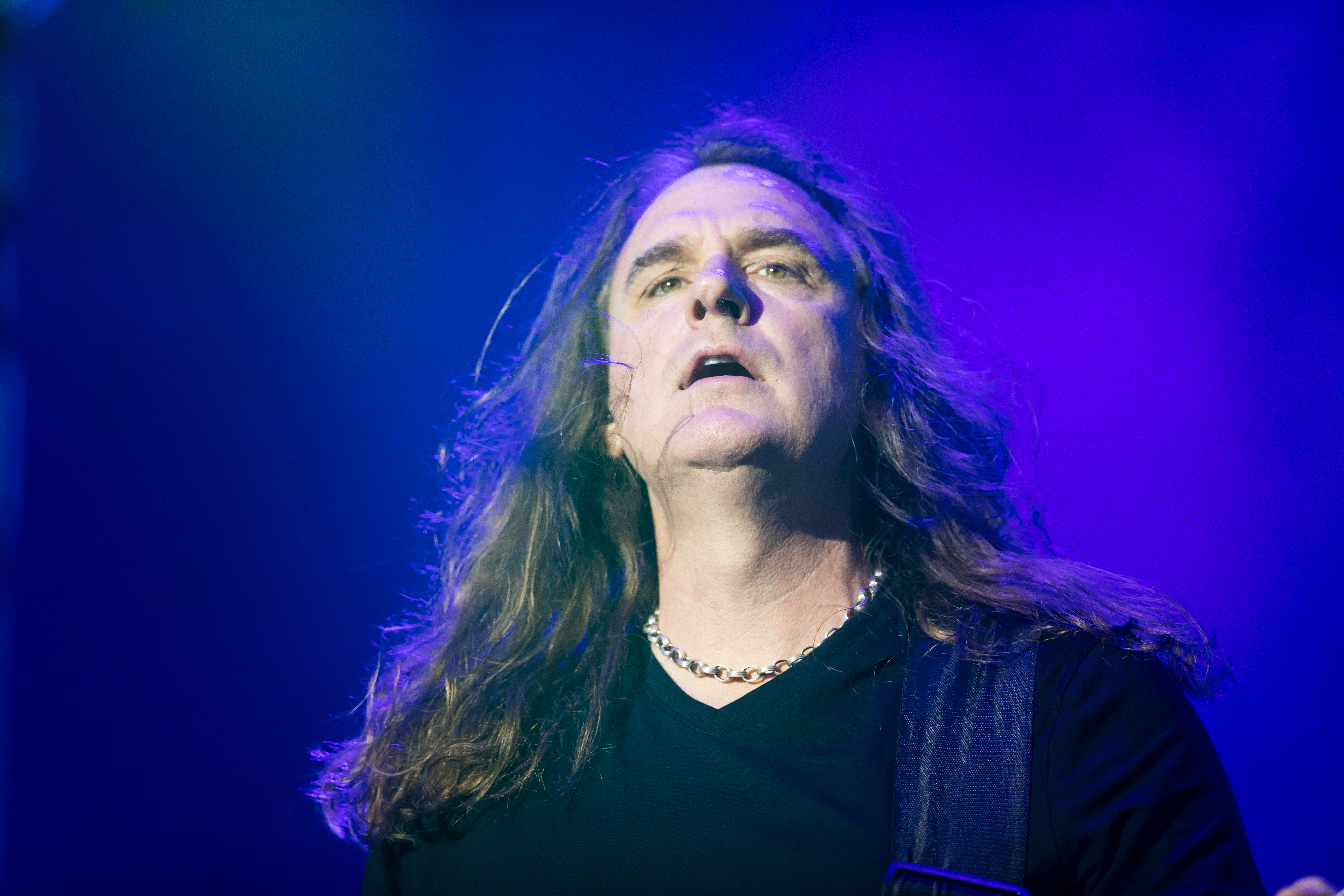 Megadeth during Wacken Open Air at Schleswig-Holstein, Wacken, , Germany on 2017-08-04, Photo: Sven Mandel